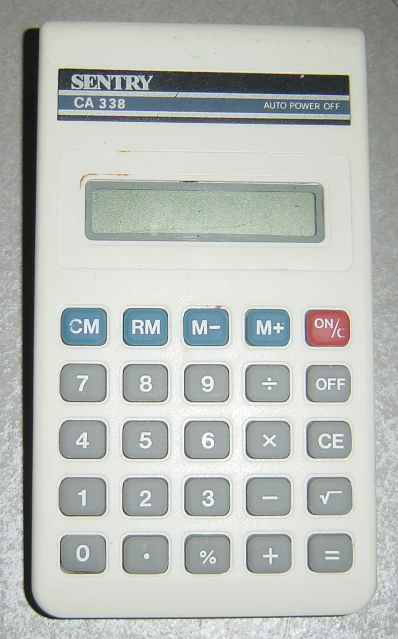 Alap számológép. Nedersaksies: Ne standaard telmesiene.